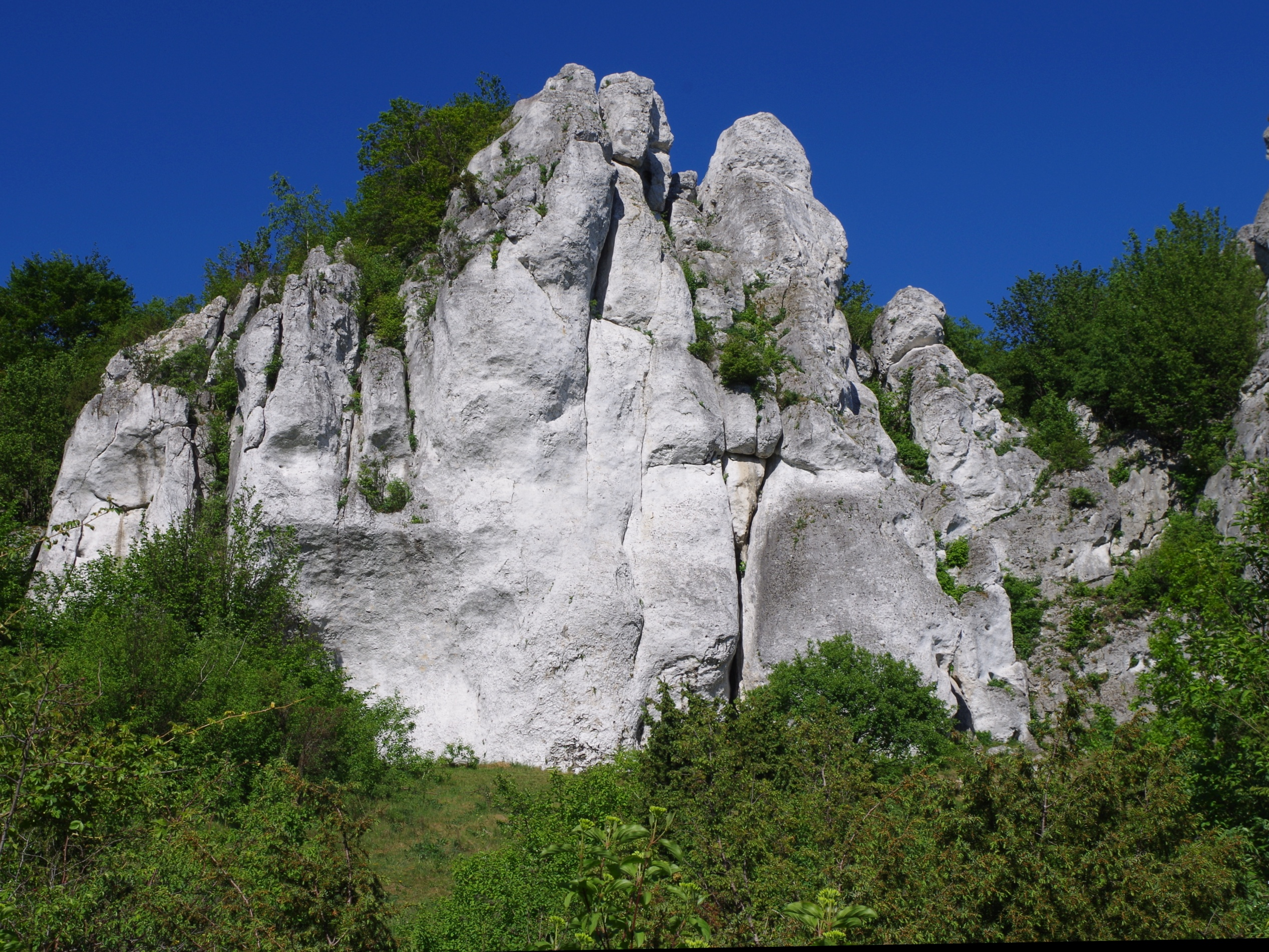 Turnia Cyklopa w Skałach Rzędkowickich